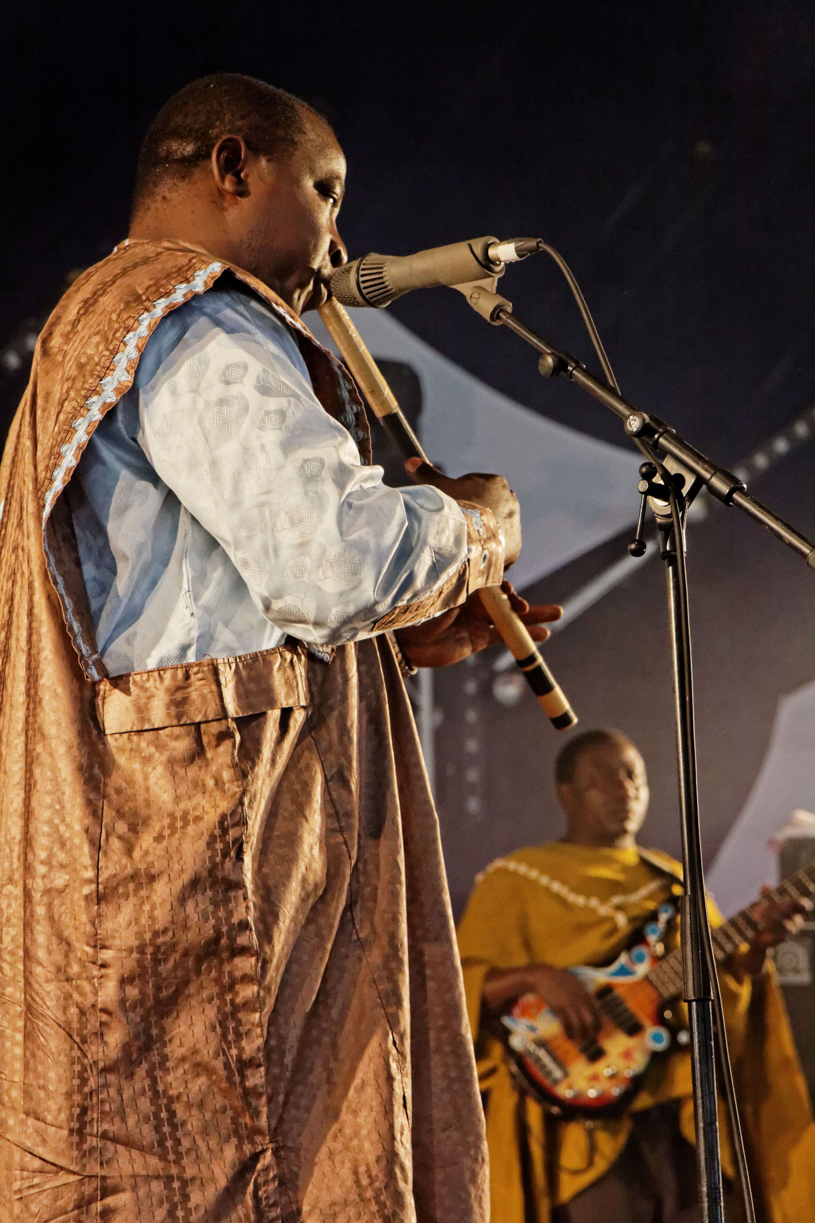 Mamar Kassey en concert sur la scène Cabaret lors du festival du bout du Monde à Crozon dans le Finistère (France).